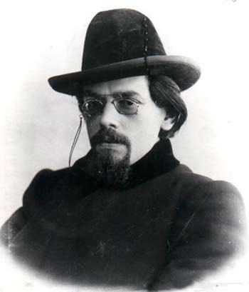 Измайлов, Александр Алексеевич